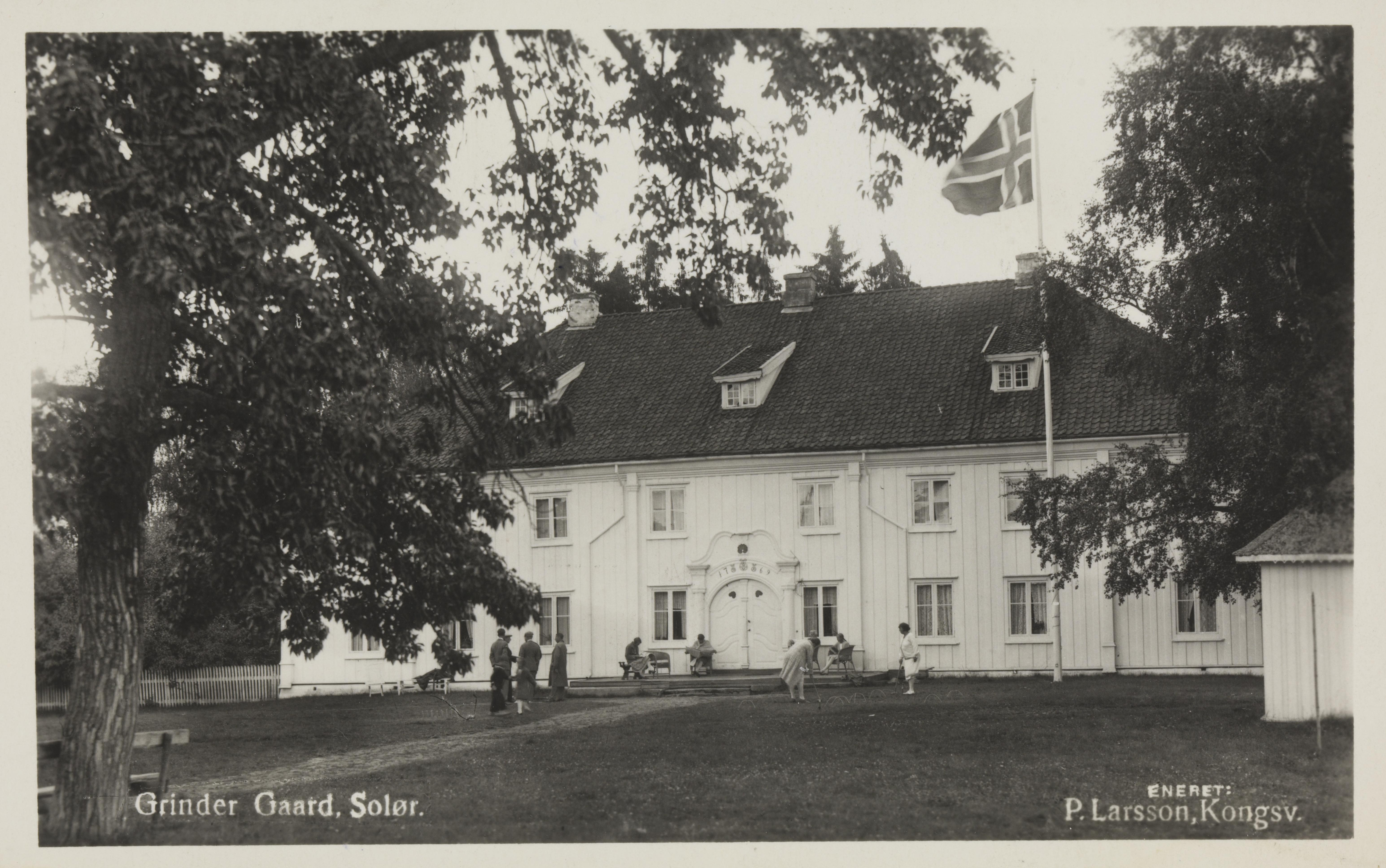 Bildet er hentet fra Nasjonalbibliotekets bildesamling Grinder,Grinder gård, Grue, Hedmark